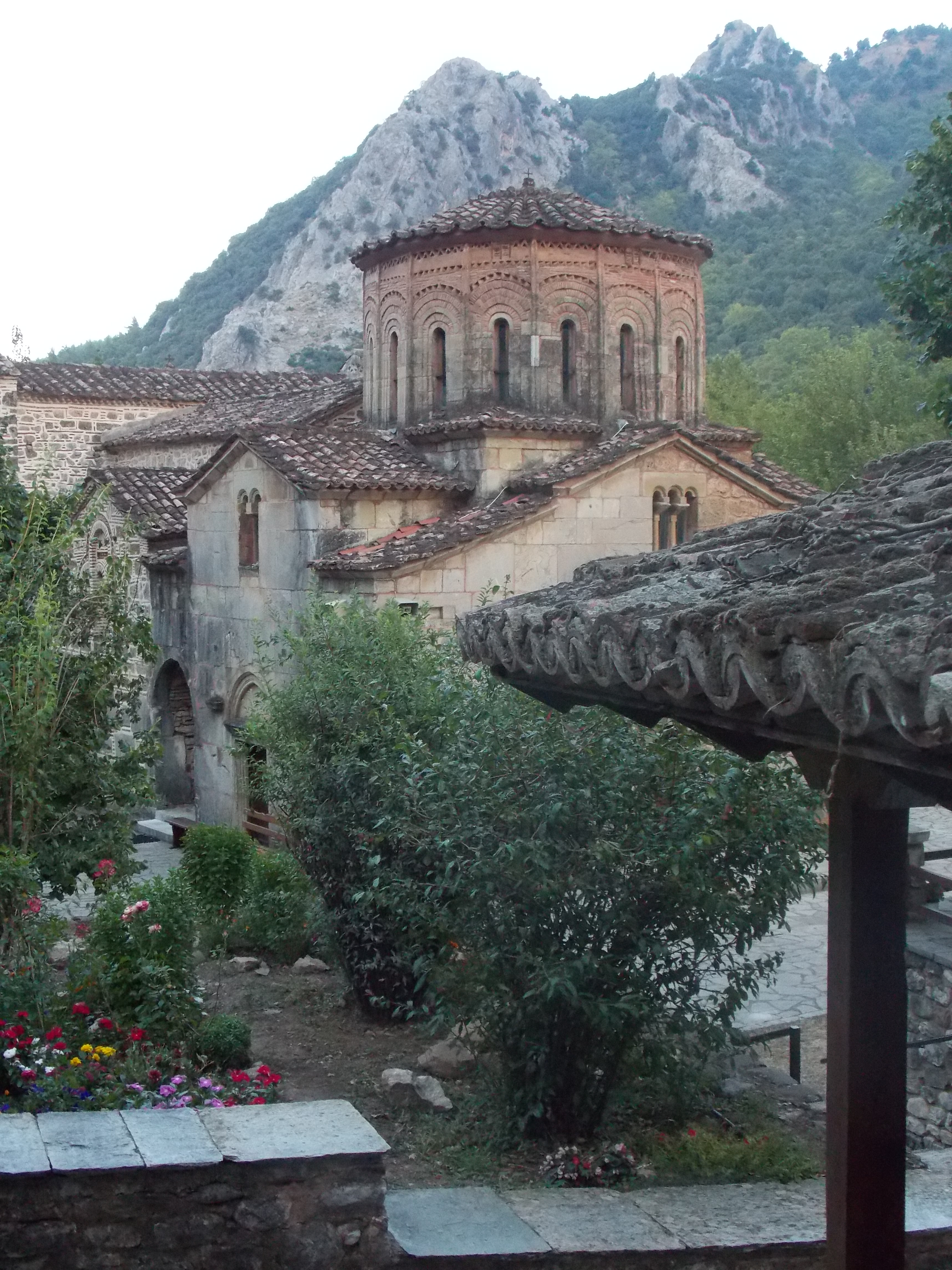 Ναός Πόρτας Παναγιάς Πύλης«Ναός Πόρτας Παναγιάς Πύλης»